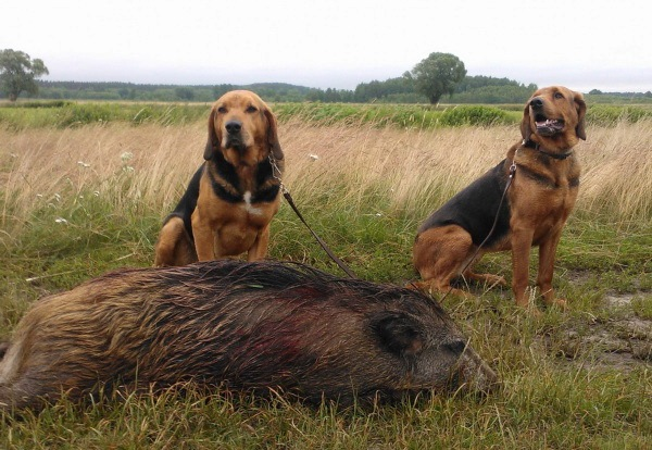 польские огары с добычей